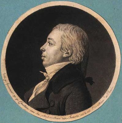 Peder Blicher Olsen (1759-1832), Danish diplomat